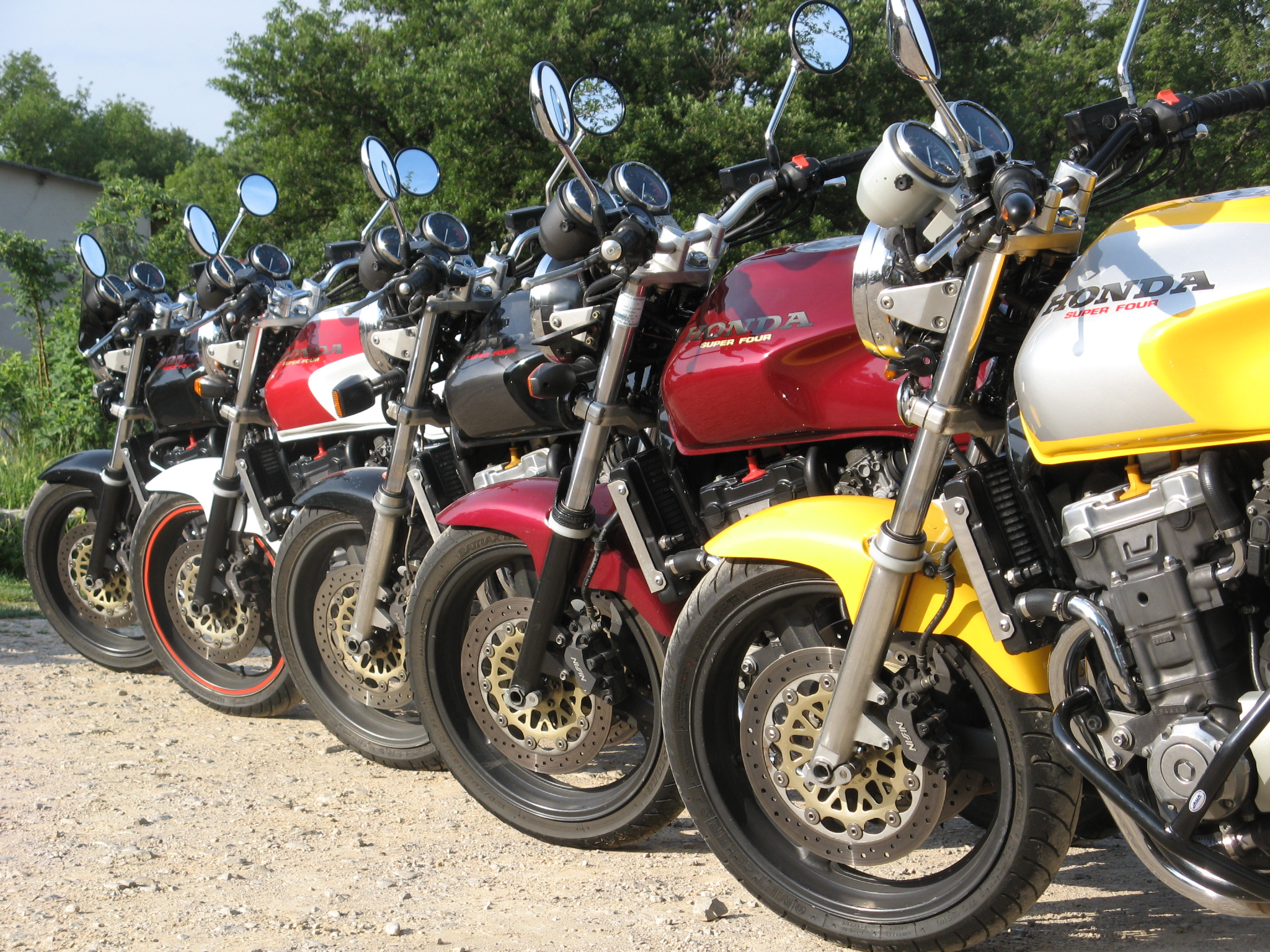 Différent coloris de big one